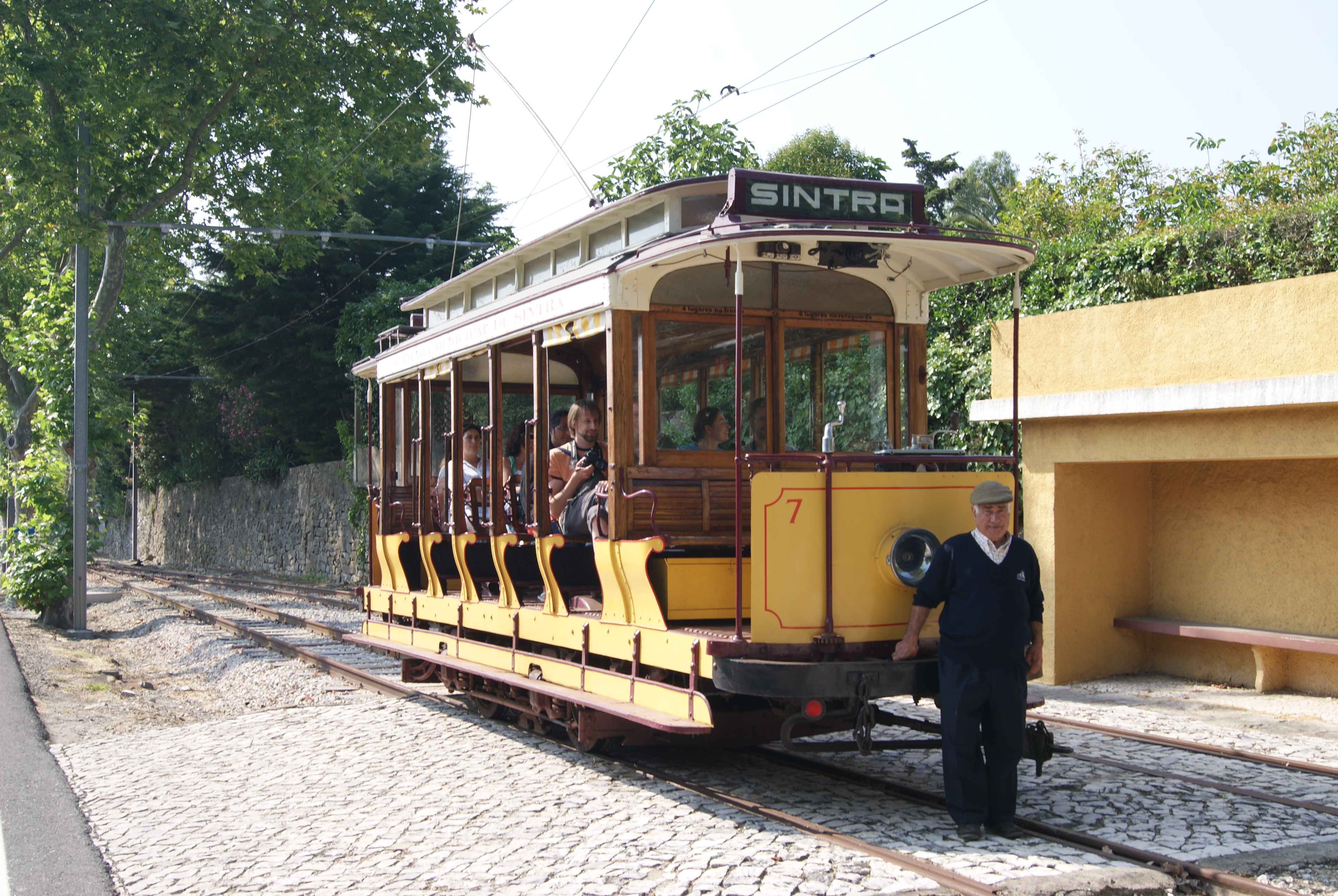 Photo: Trams aux Fils.